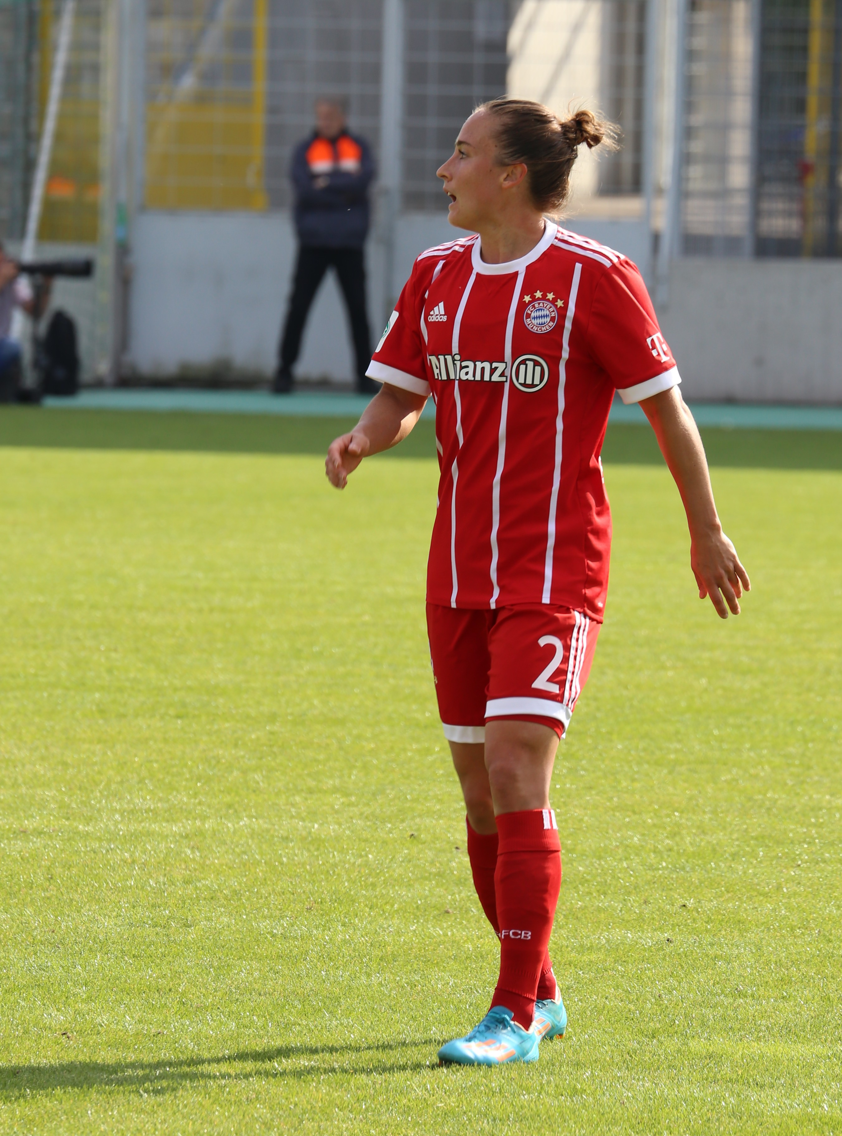 Gina Lewandowski beim Frauen-Bundesliga-Spiel FC Bayern München gegen 1. FC Köln am 24. September 2017 im Stadion an der Grünwalder Straße (Ergebnis war 2:0)